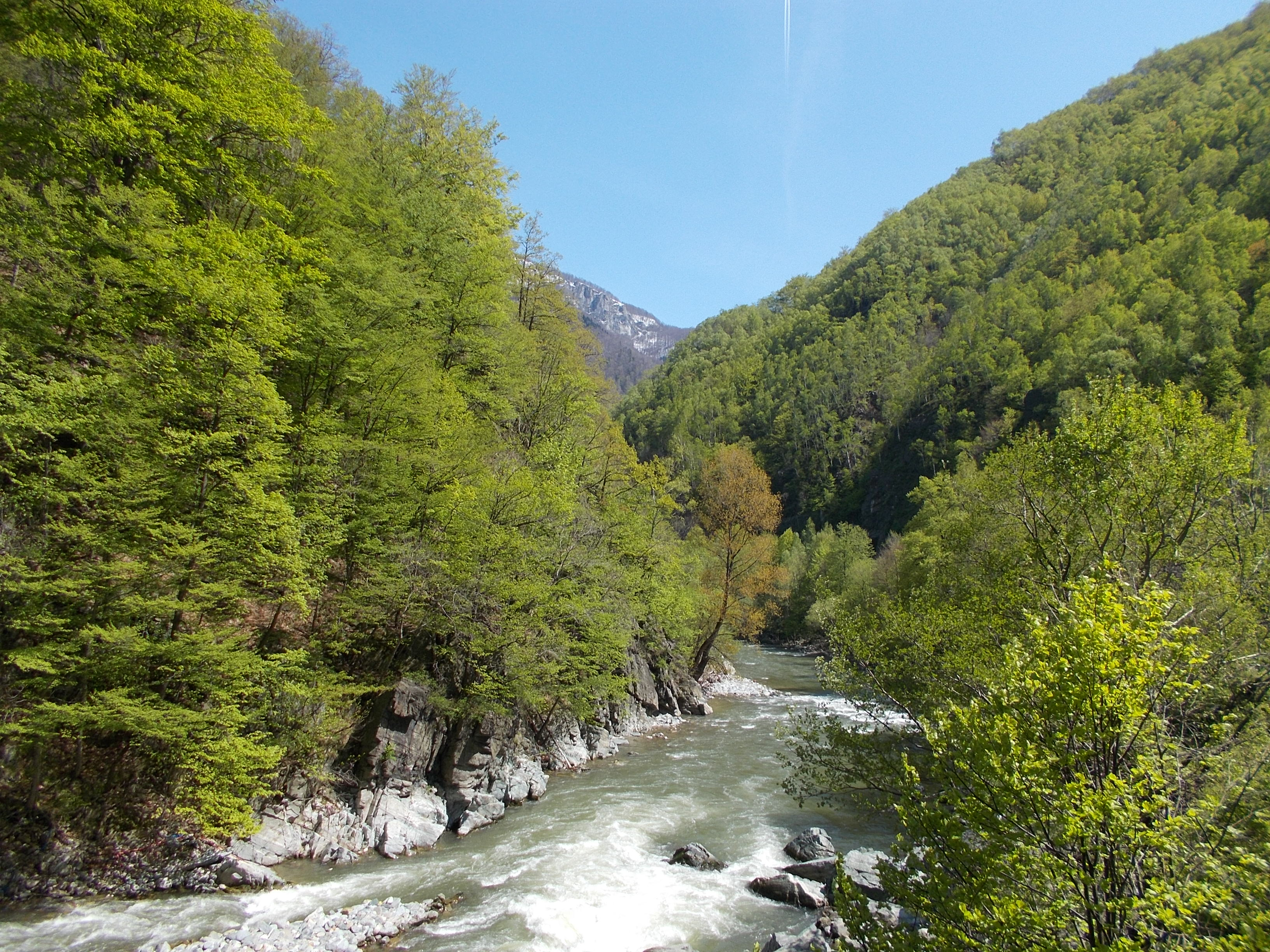 Parcul Național Defileul Jiului, Râul Jiu